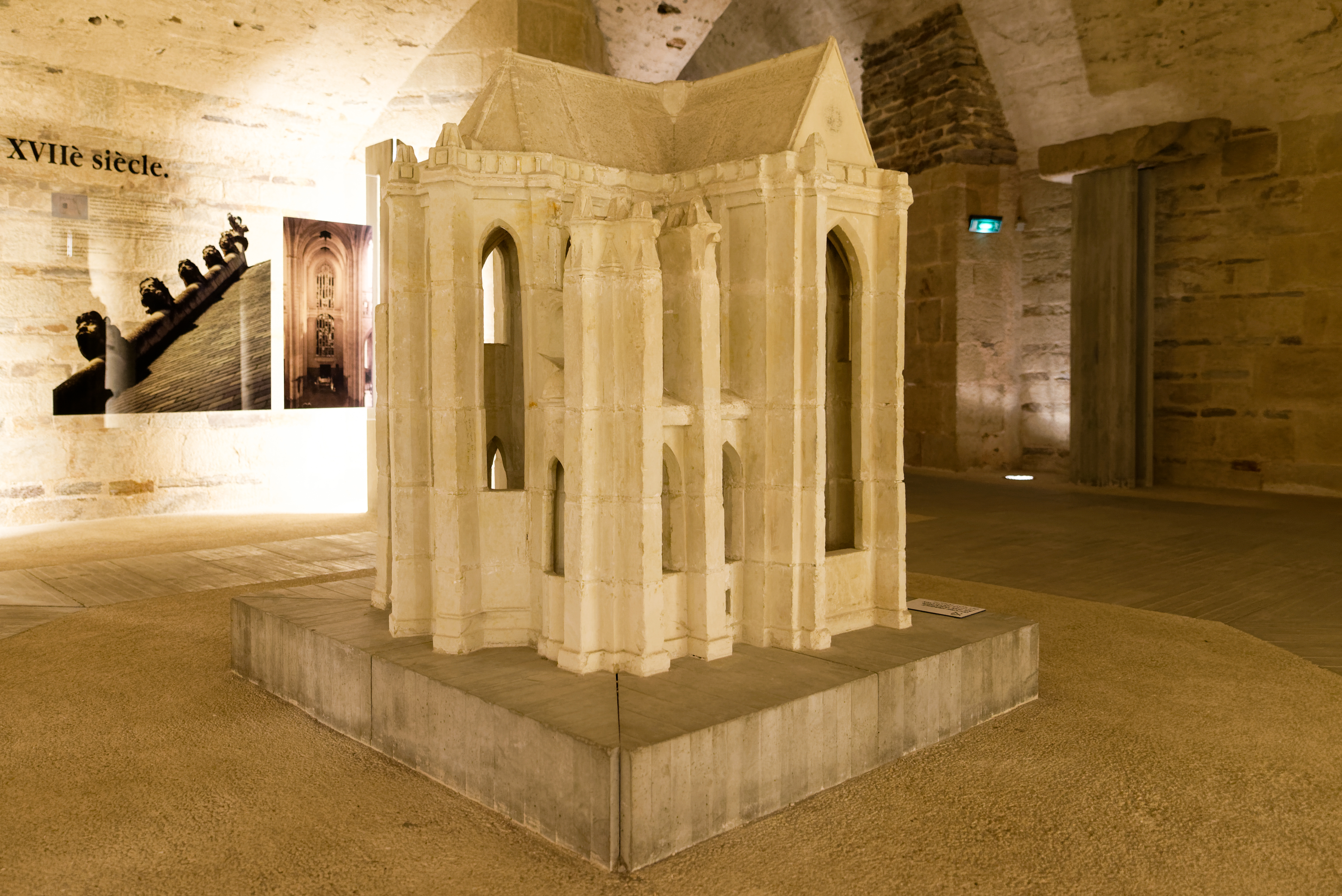 Maquette en tuffeau du XVIIe siècle. Projet d'achèvement du chœur gothique de la cathédrale exposée dans la crypte. Cathédrale Saint-Pierre-et-Saint-Paul de Nantes.(Loire-Atlantique, Pays de la Loire, France) .